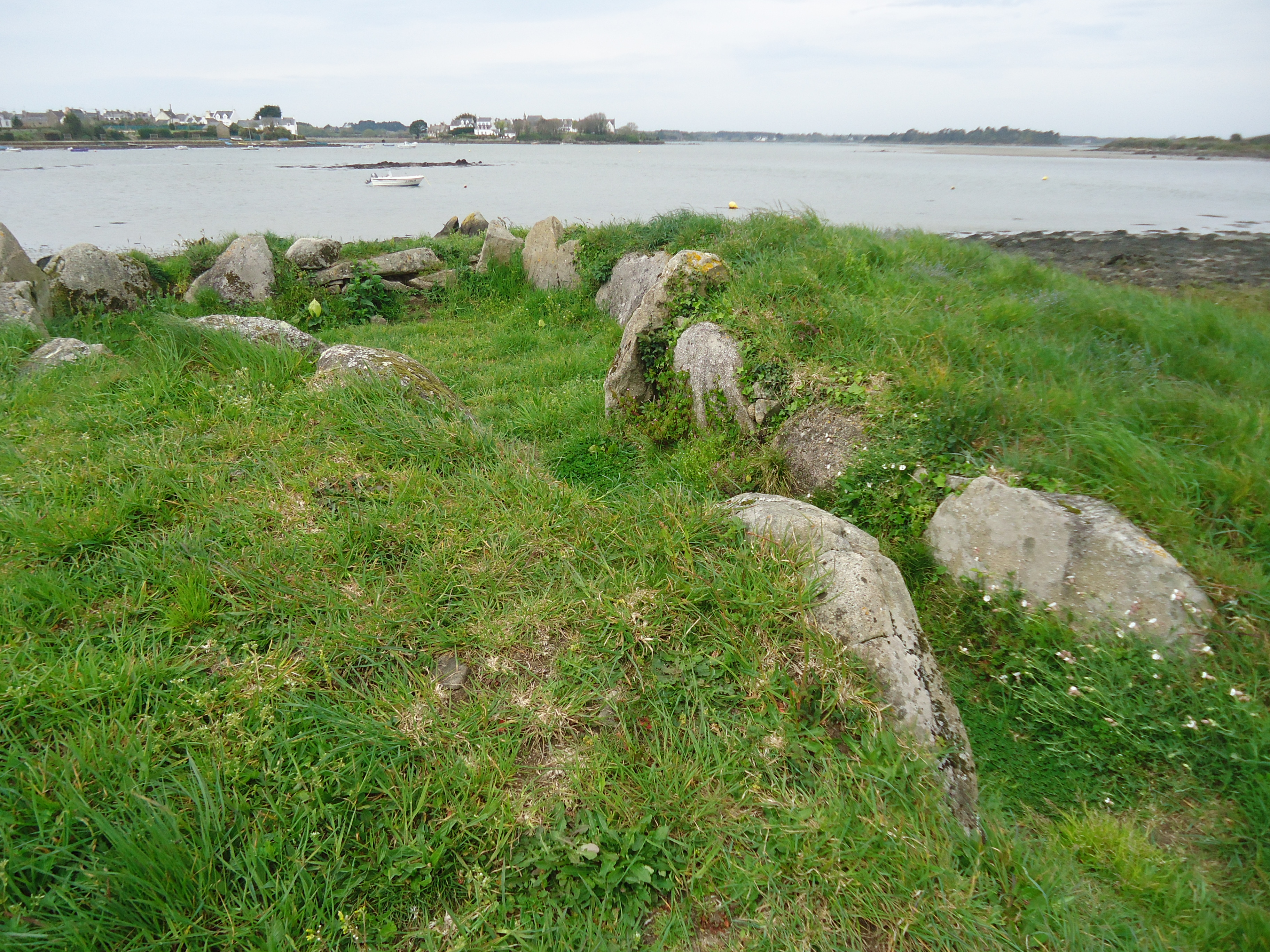 Dolmen du Moulin des Oies à Belz